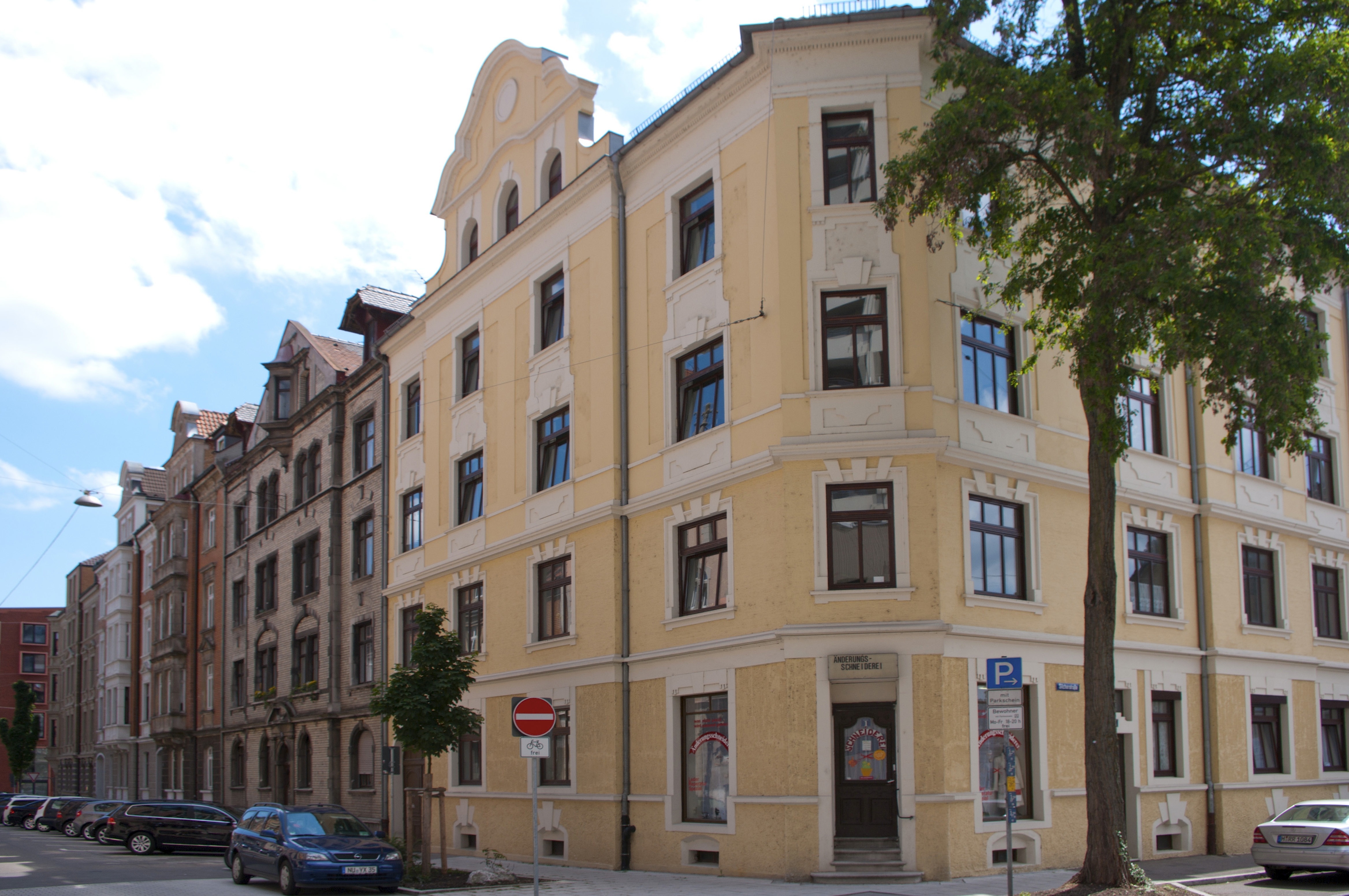 Das Ensemble besteht aus der Westseite der Johannisstraße und dem Gebäude Silcherstraße 1. Erbaut 1900-1903, Architekt Paul Frank